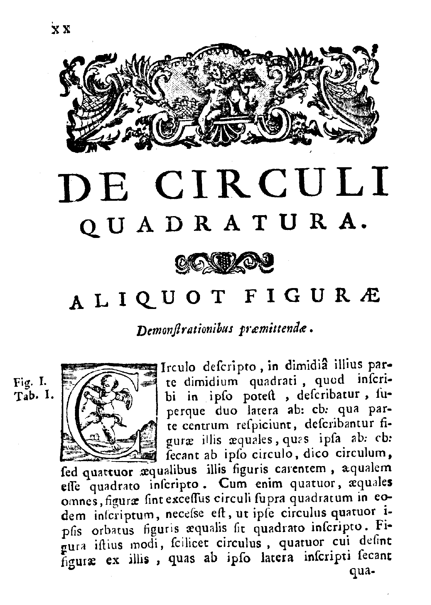 Della quadratura del circolo e del doppiamento del cubo con la giunta di altre simili cose dimostrazioni geometriche d.d.d. alla maesta della SS.ma Regina Madre Vergine da Filippo Carmignani .... - In Firenze : nella stamperia di Pietro Gaetano Viviani, 1751. - XX, 87, [1] p., VIII c. di tav. ripiegate calcografiche ; 4º .